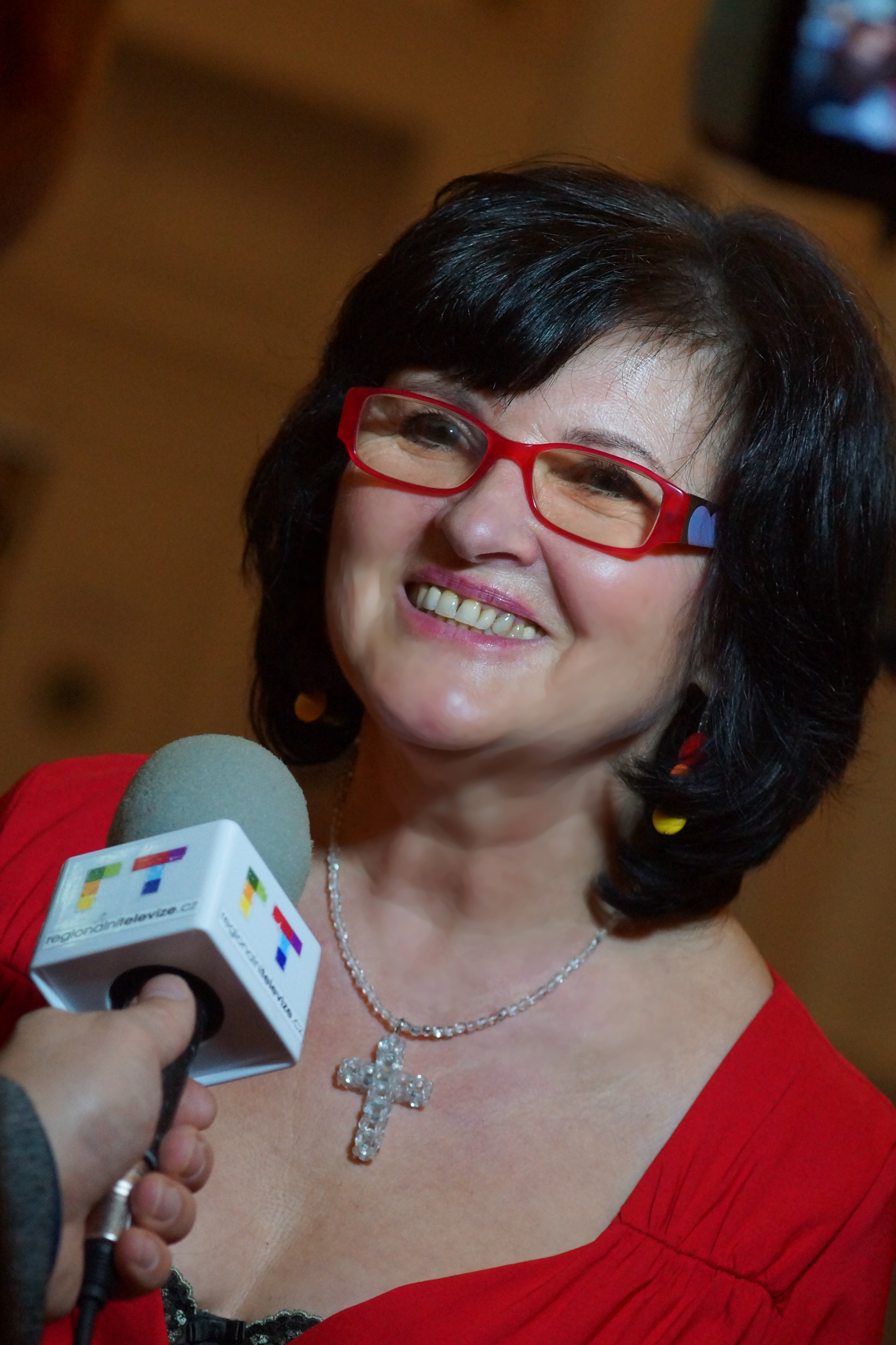 Básnířka a spisovatelka Alenka Vávrová